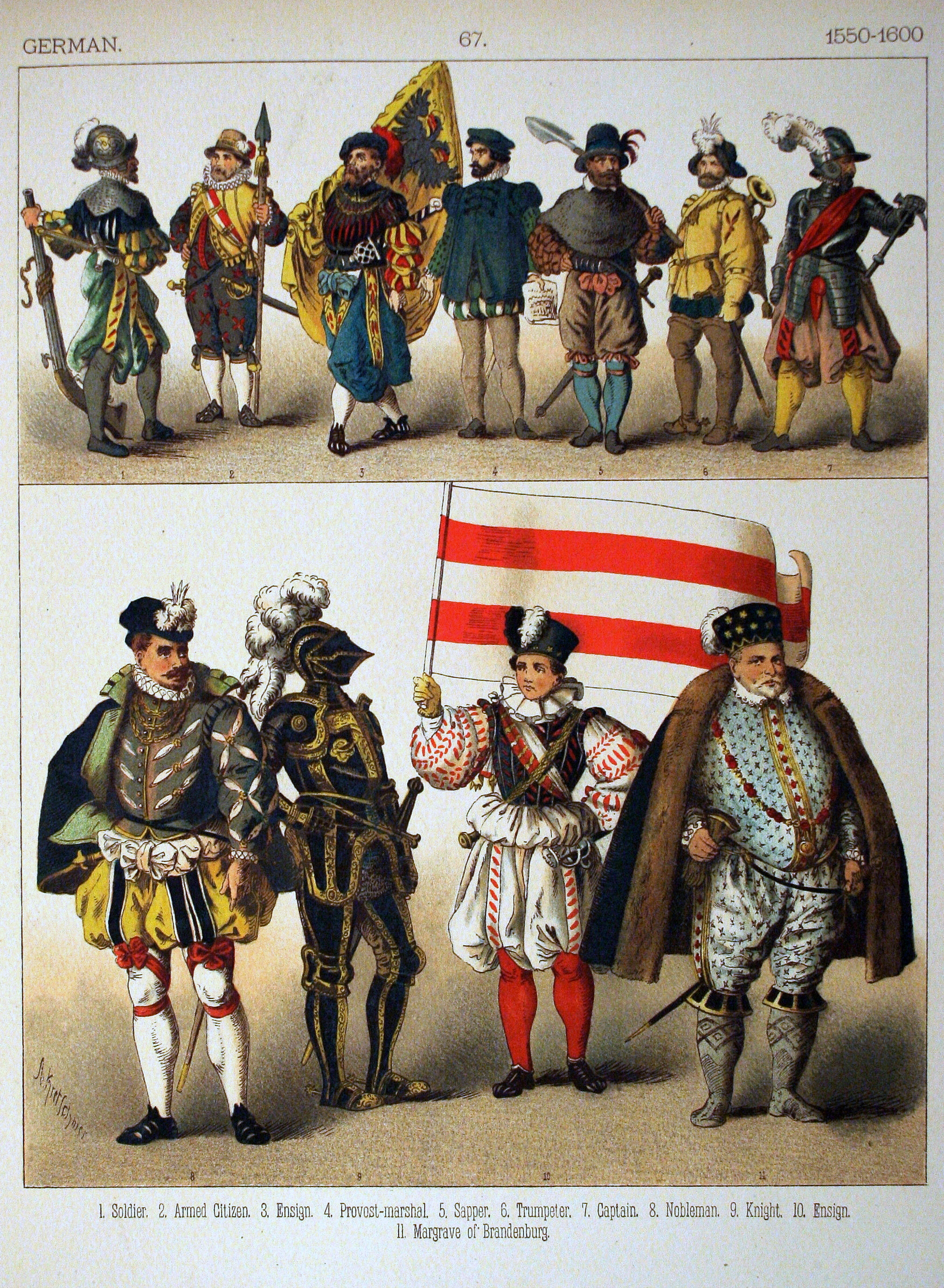 1550-1600, German